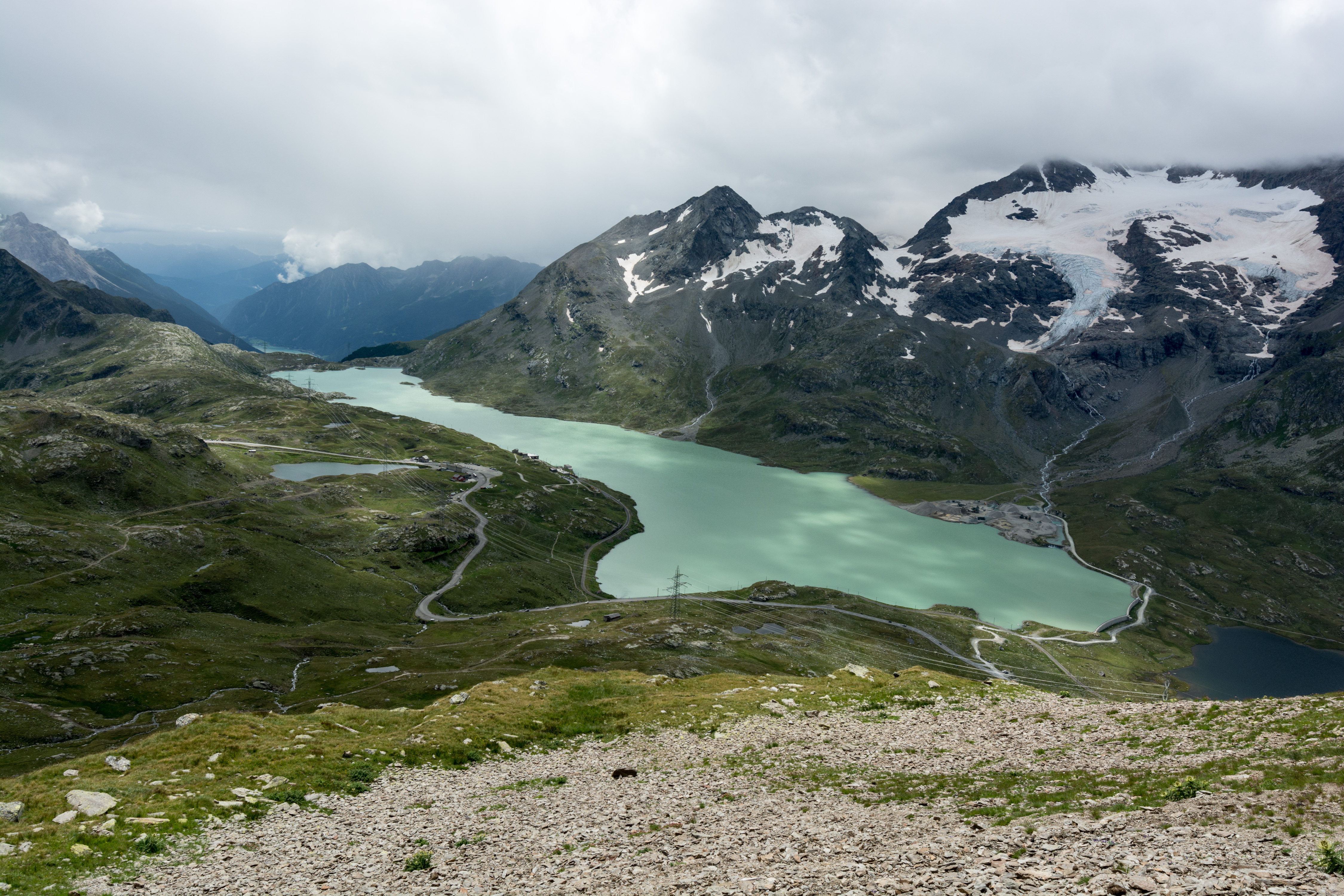 Lago Bianco - Gesamtansicht vom Piz Lagalb. Hinter dem See in der Mitte Sassal Mason, nach rechts: die Carallücke und der Cambrenagletscher. Piz Caral und Piz Cambrena sind wolkenverhüllt. Ganz hinten links sieht man den Lago di Poschiavo